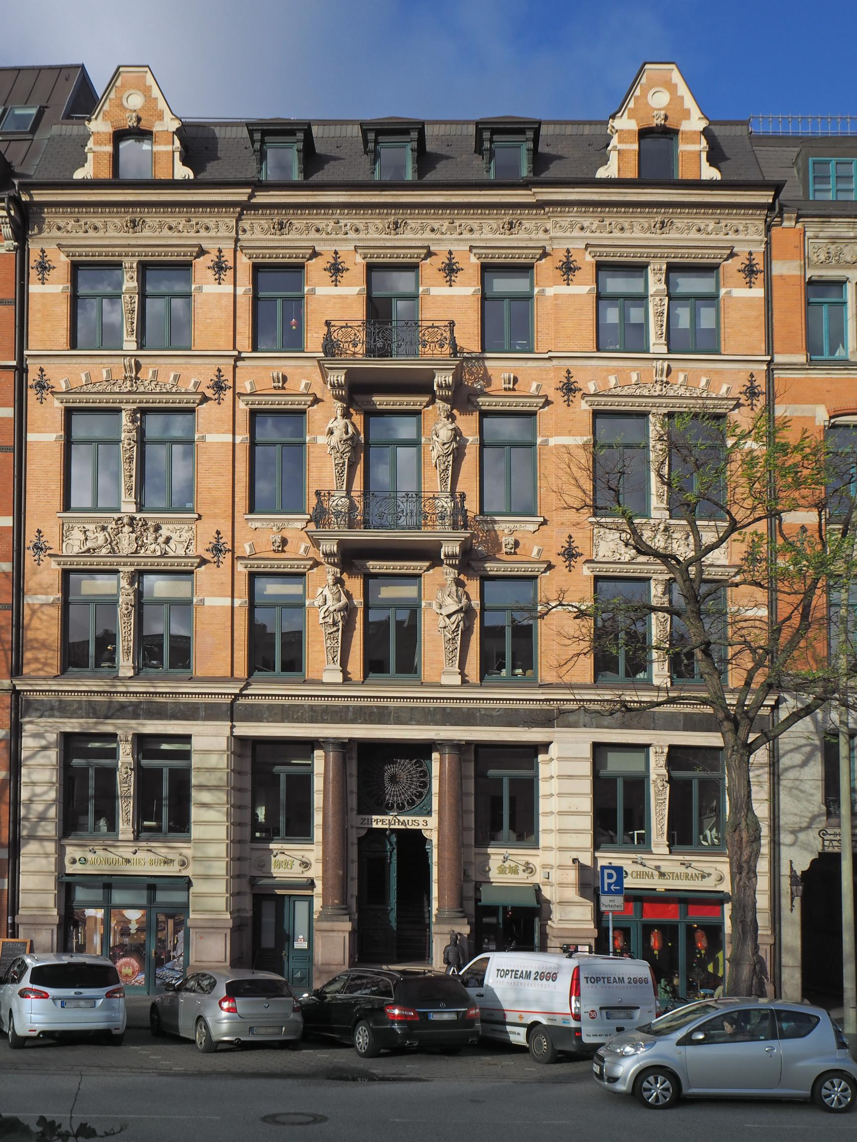 Hamburg-Altstadt, Zippelhaus 3, Foto: 2015